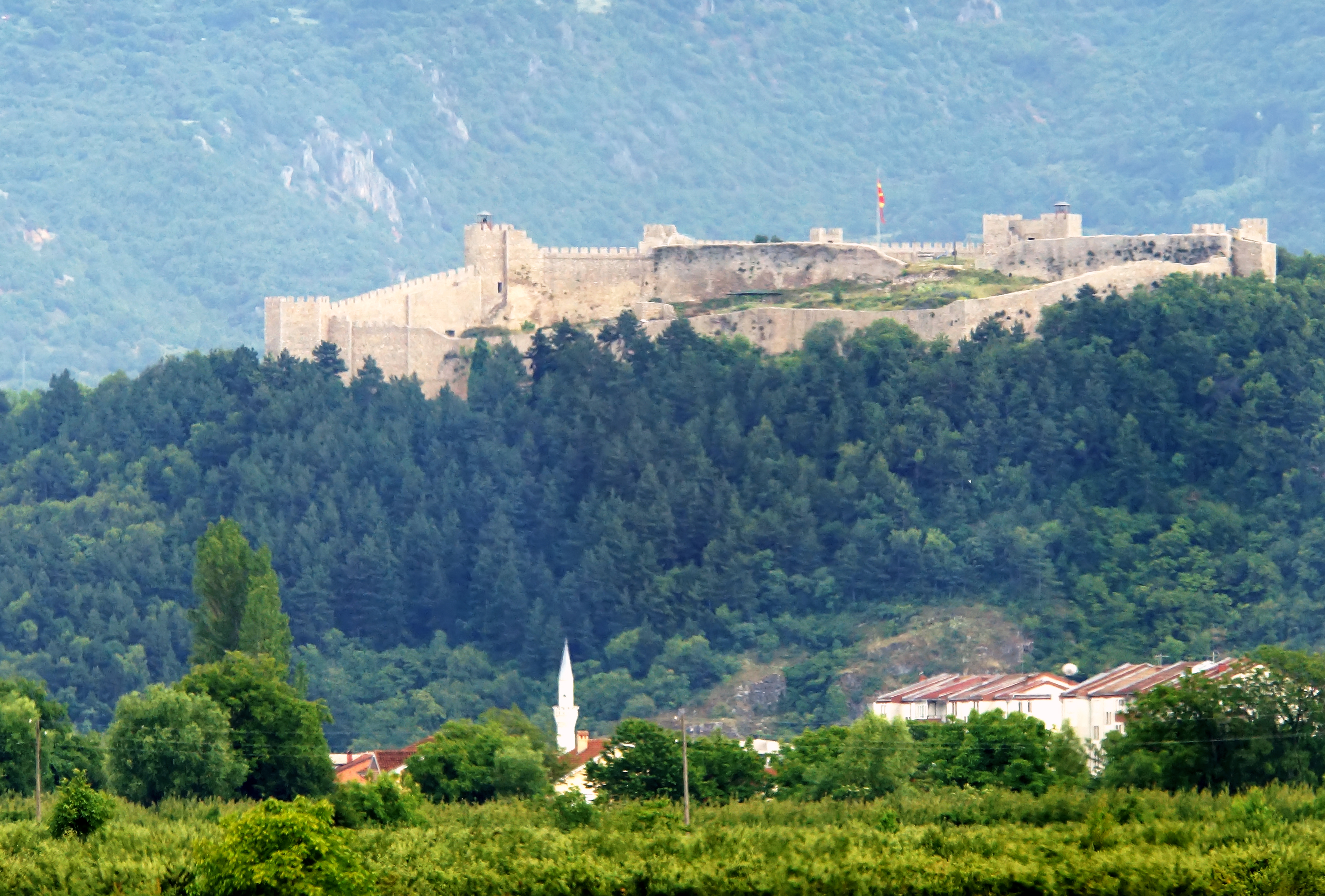 Samuels Fortress